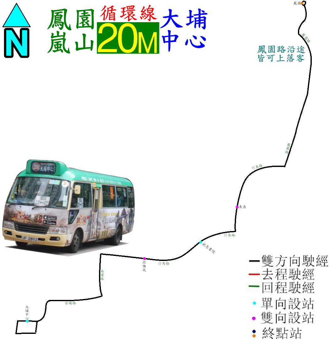 中文（香港）: 新界專線小巴20M線的走線圖